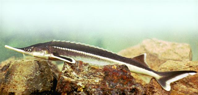 Acipenser ruthenus